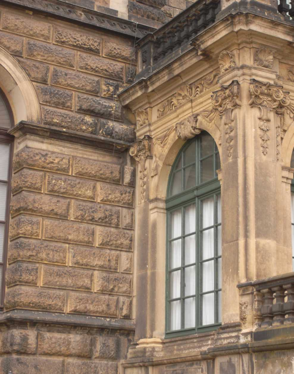 Zwinger, Dresden